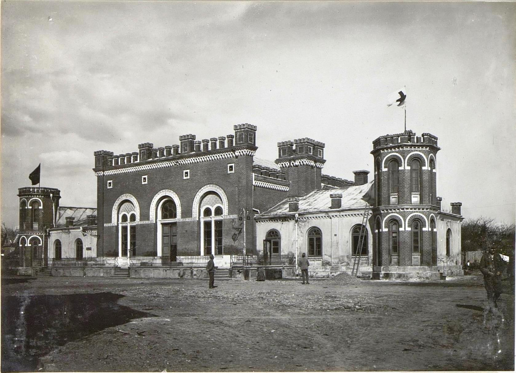 Синагога в Садагоре.